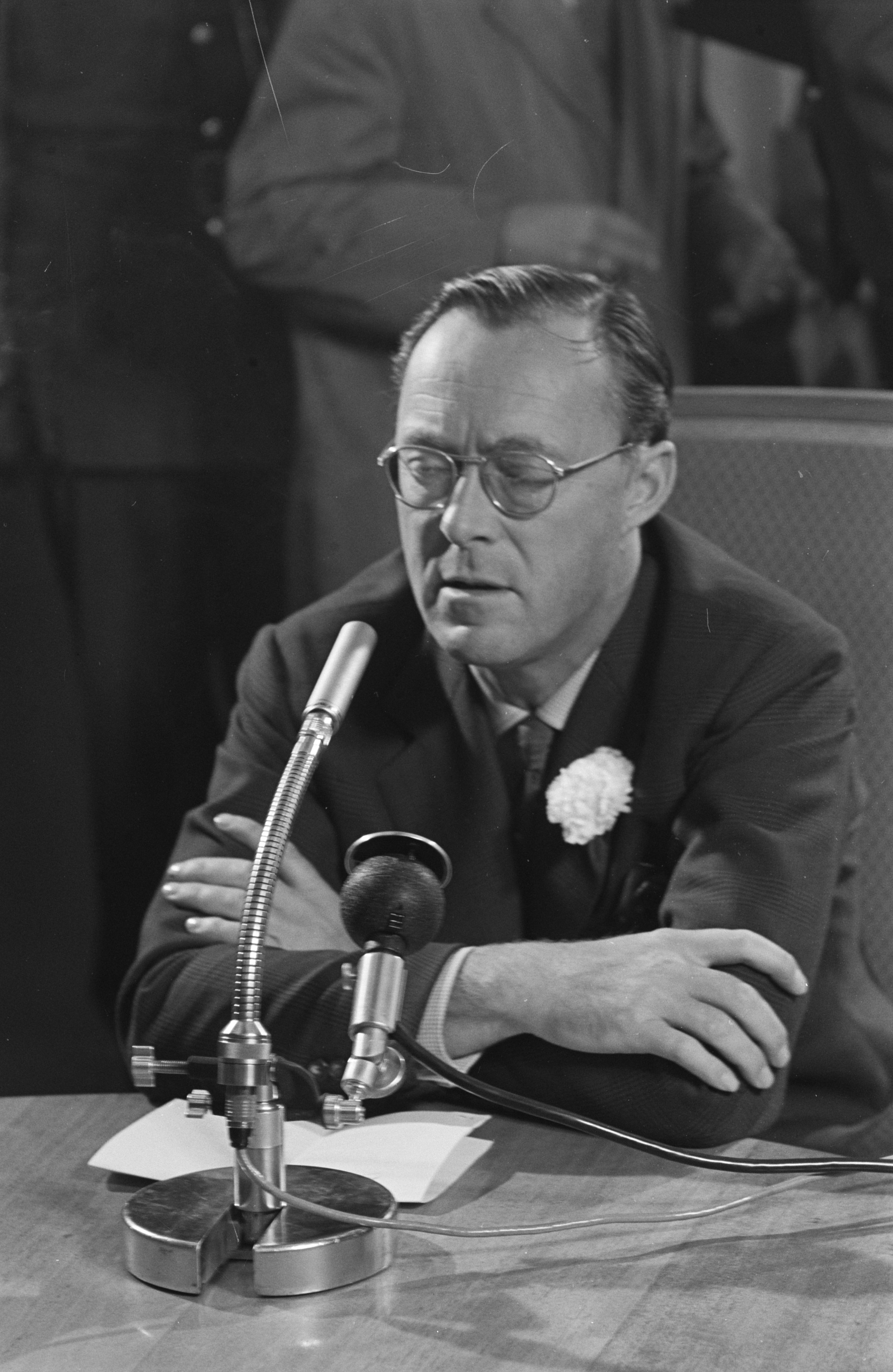 Collectie / Archief : Fotocollectie Anefo Reportage / Serie : [ onbekend ] Beschrijving : Aankomst van Prins Bernhard op Schiphol vanuit Zuid Amerika , Prins Bernhard tijdens persconferentie Datum : 4 november 1959 Locatie : Noord-Holland, Schiphol Trefwoorden : AANKOMST, persconferenties Persoonsnaam : Bernhard, prins Fotograaf : Pot, Harry / Anefo Auteursrechthebbende : Nationaal Archief Materiaalsoort : Negatief (zwart/wit) Nummer archiefinventaris : bekijk toegang 2.24.01.05 Bestanddeelnummer : 910-7966